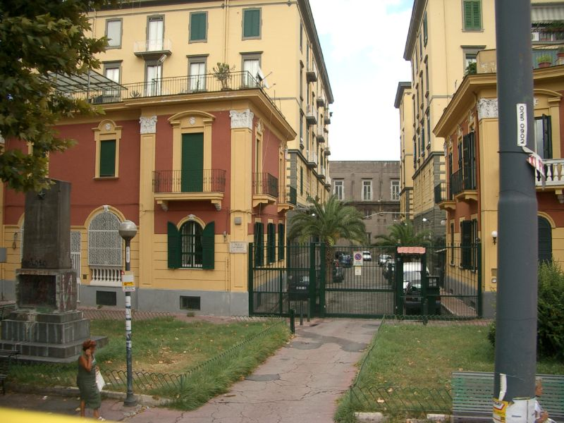 Napoli, Campania, Italia - Private houses in Emiciclo di Capodimonte.